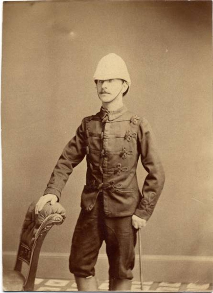 Napoléon Eugène Louis Jean Joseph Bonaparte (* 16. März 1856 in Paris, Palais des Tuileries; † 1. Juni 1879 in Südafrika) war kaiserlicher Prinz von Frankreich (Prince Imperial und Fils de France) und einziger Sohn von Kaiser Napoléon III. und dessen Ehefrau, Kaiserin Eugénie de Montijo.